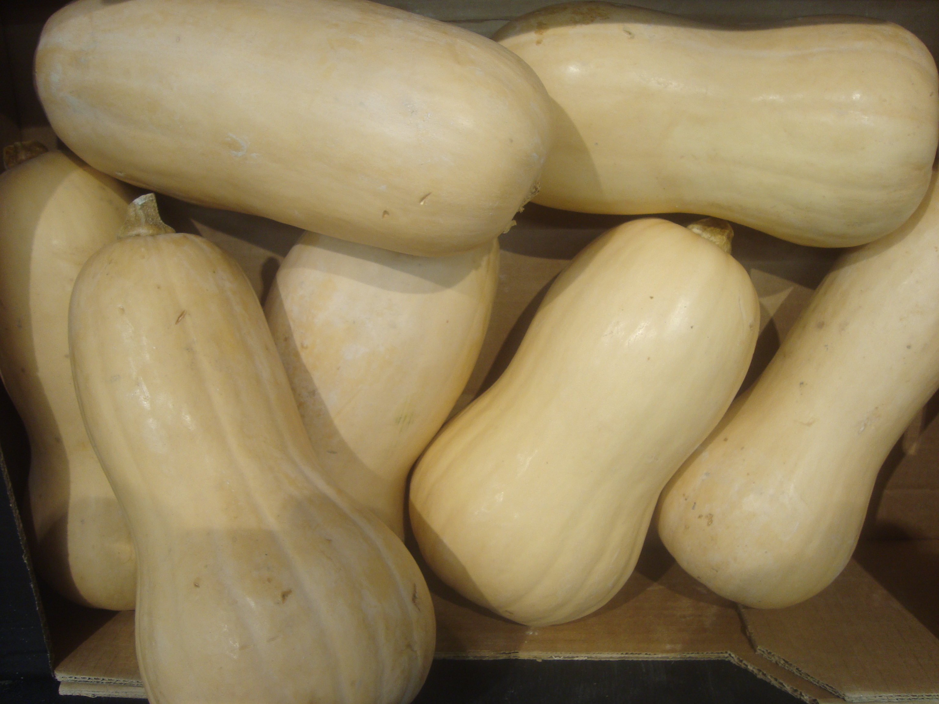 Calabazas de invierno, calabazas butternut.